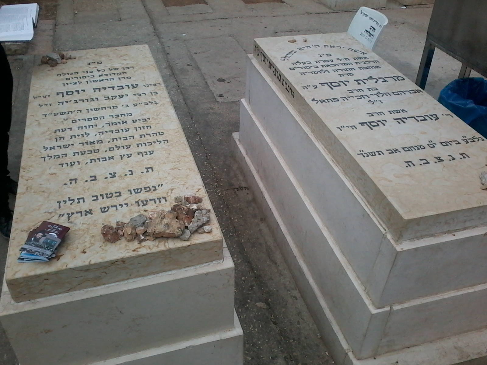 קברי הרב עובדיה יוסף ואשתו מרגלית בבית הקברות סנהדריה